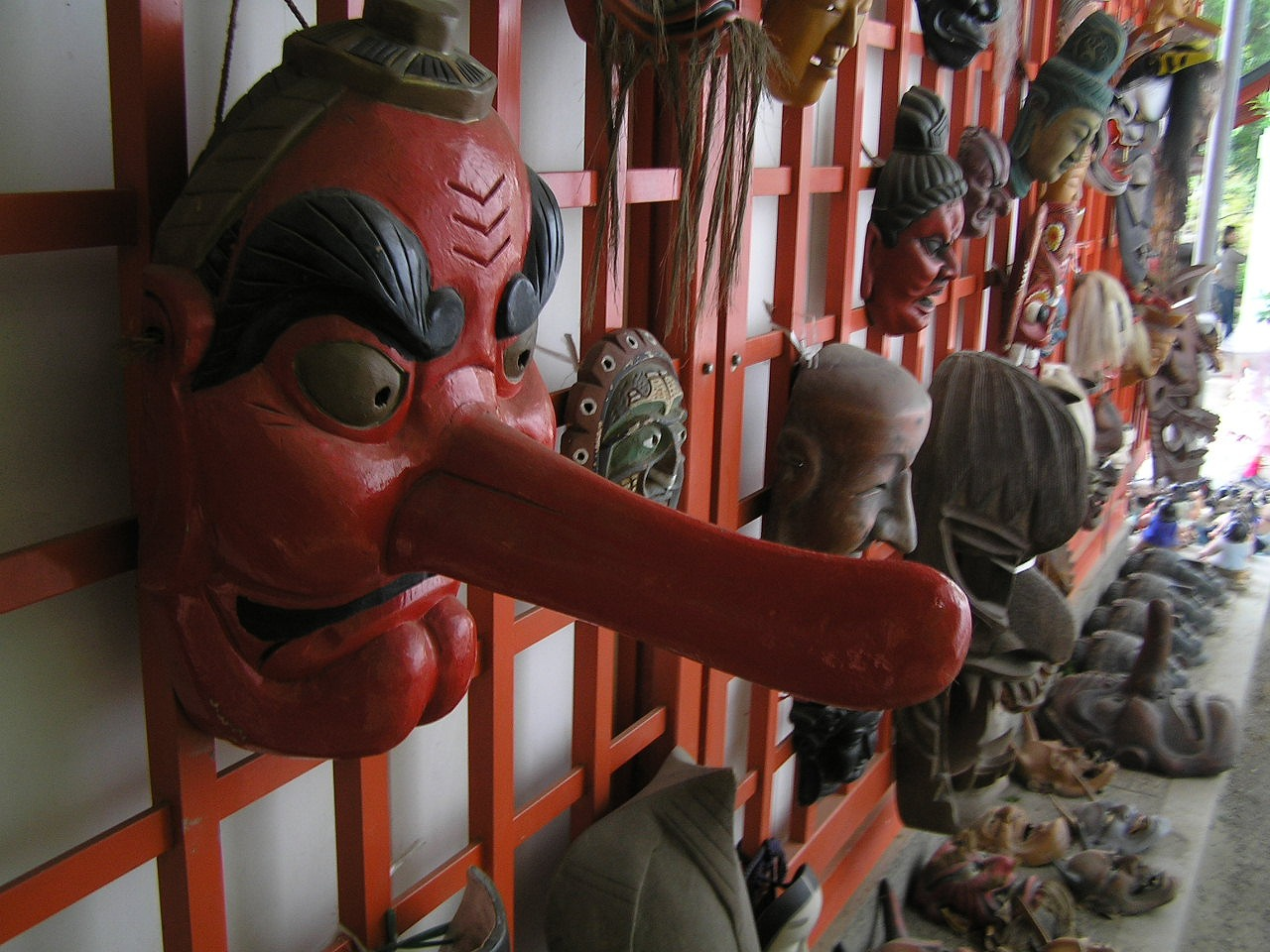 淡島神社人形・天狗の面4